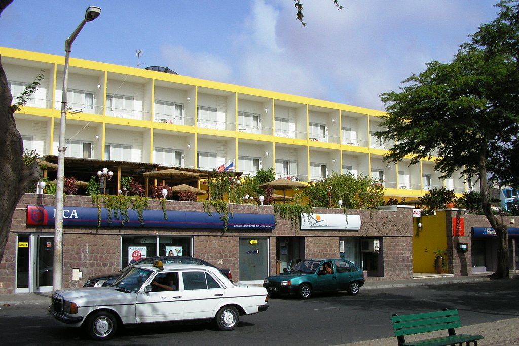 Porto Grande hotel in Mindelo, São Vicente island, Cape Verde